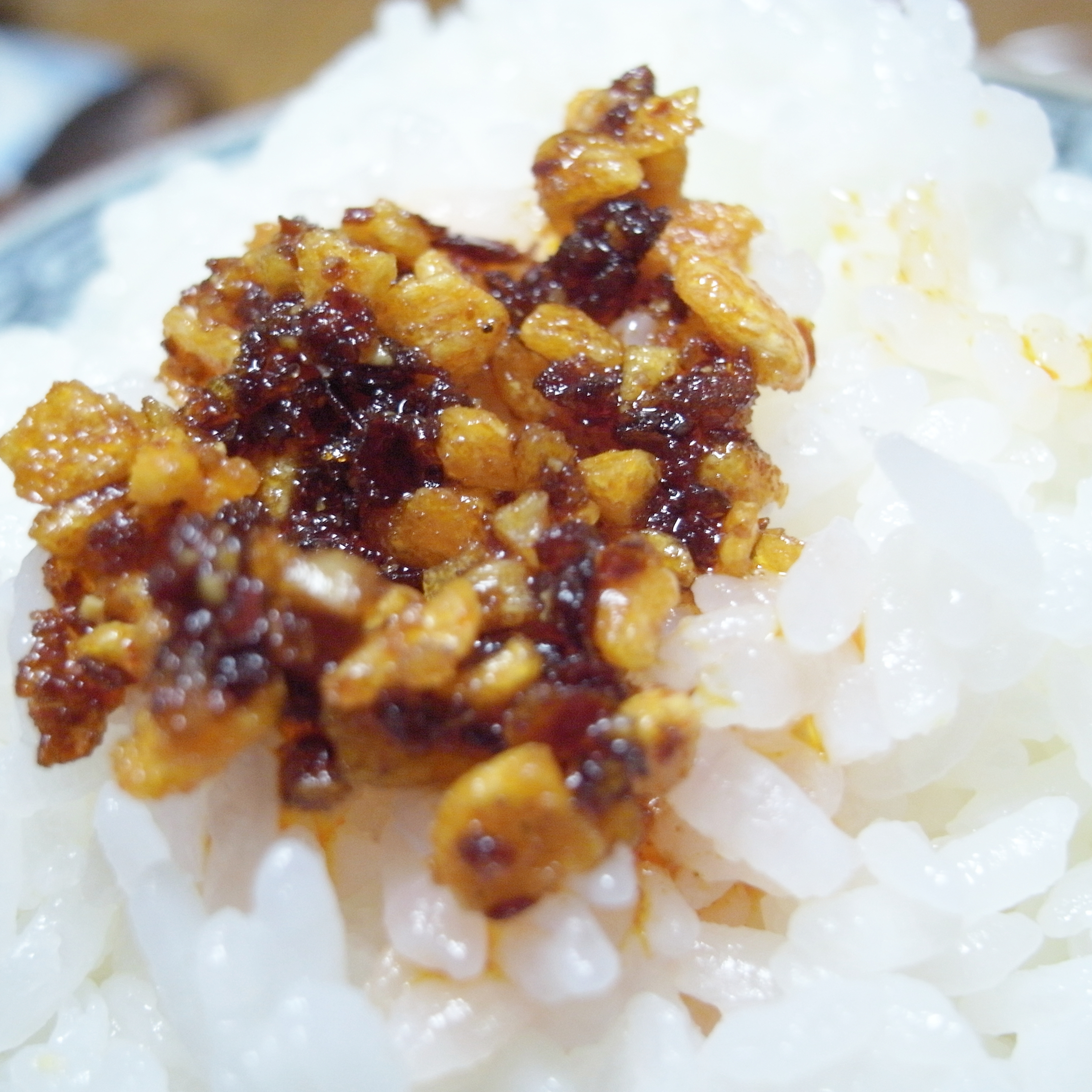 ご飯にのせていただきました